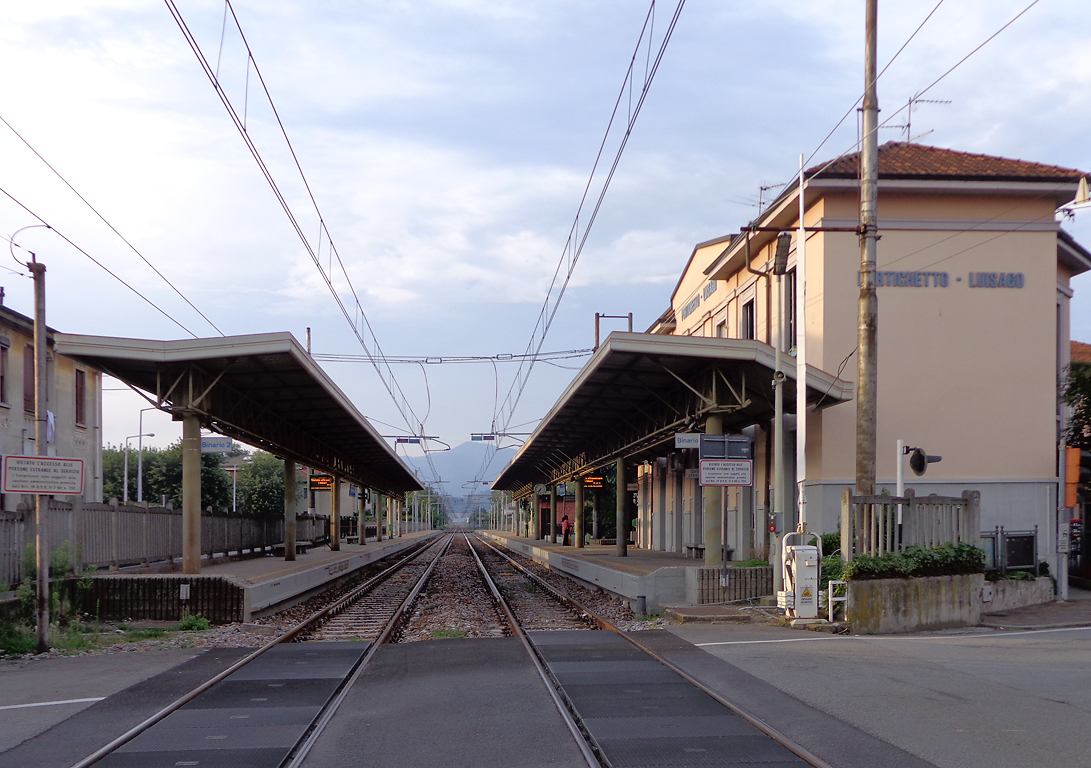 Stazione ferroviaria di Portichetto-Luisago.